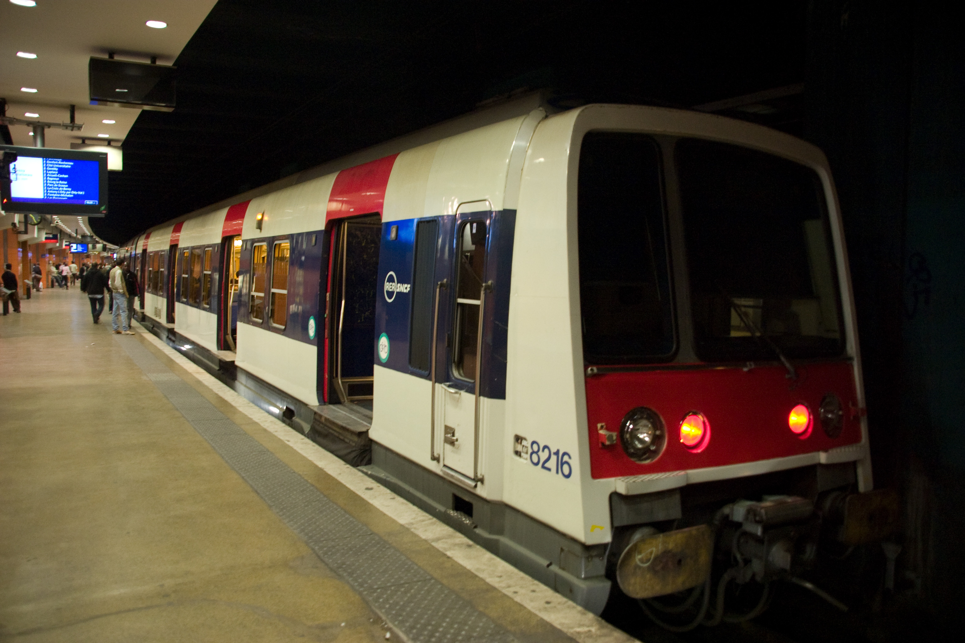 Gare du Nord, Paris, France